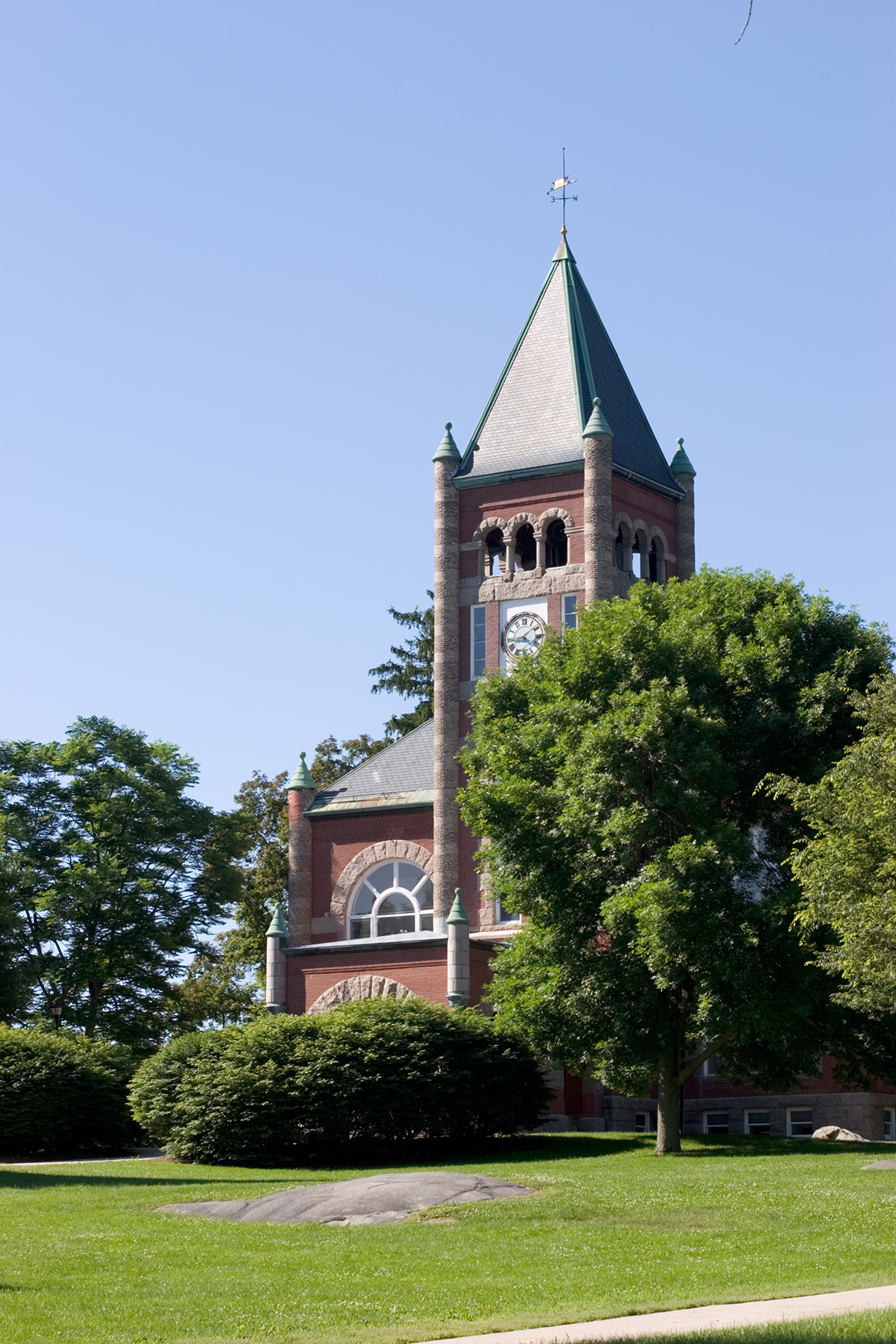 Durham, NH.